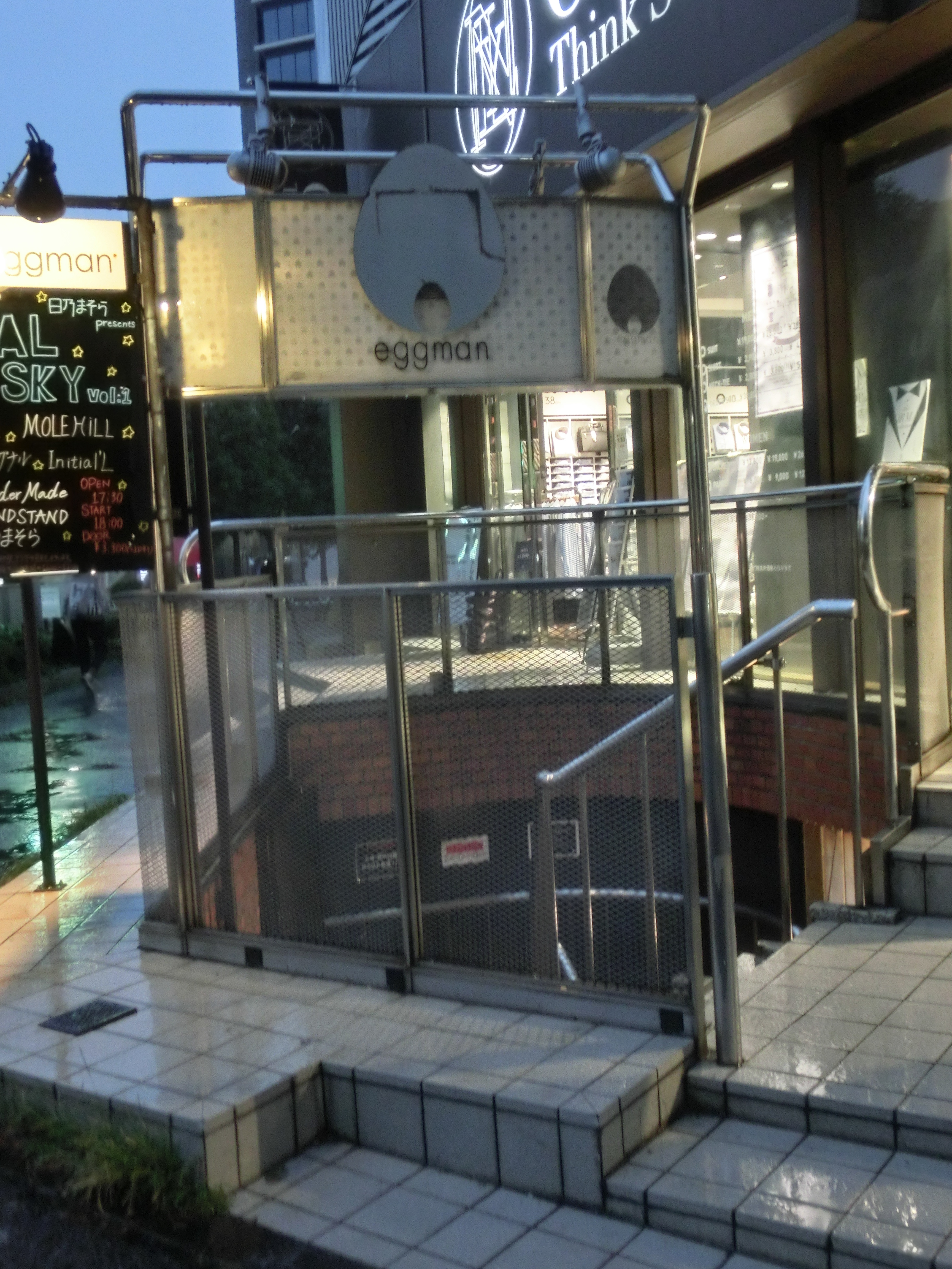 渋谷エッグマン